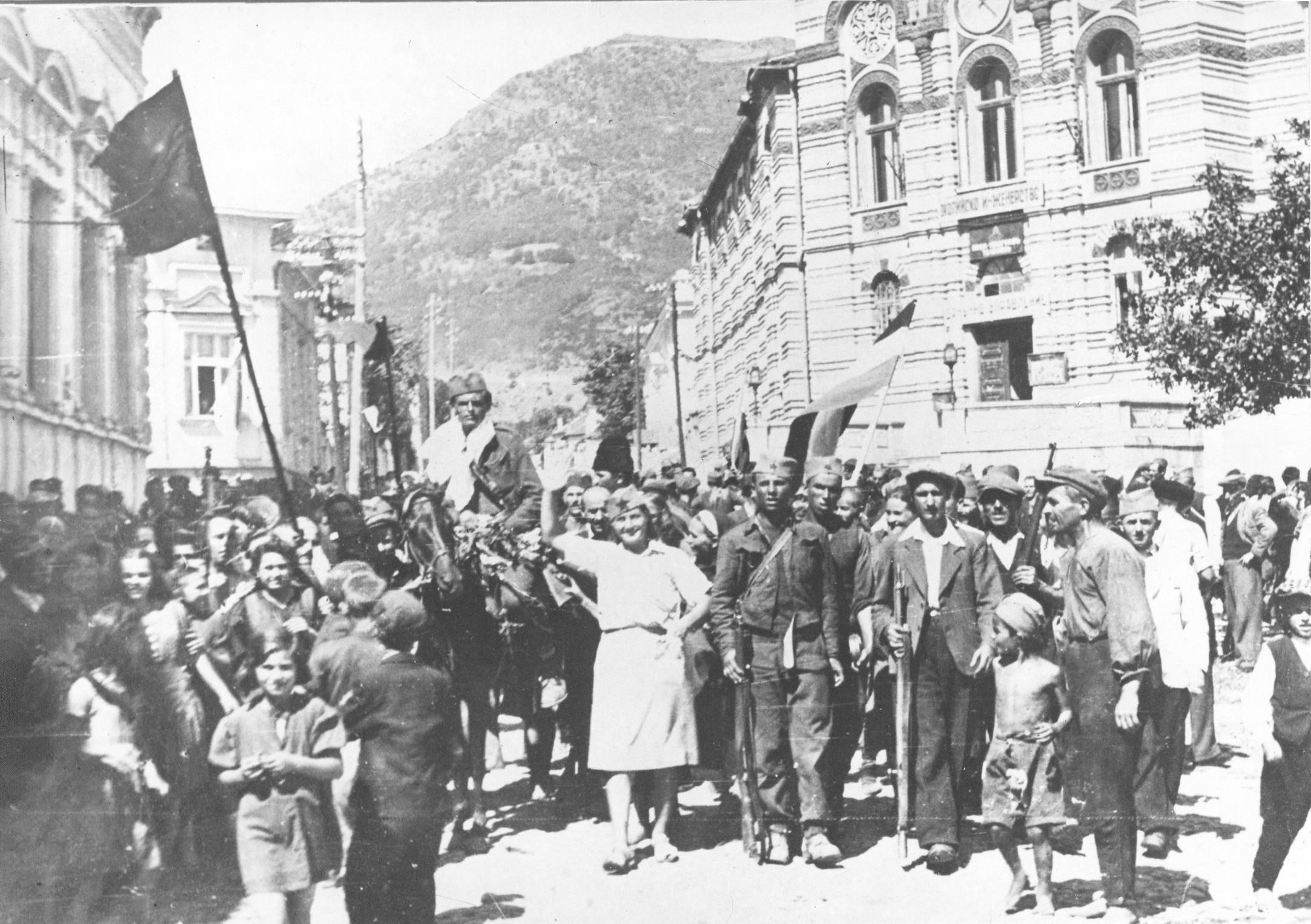 Srpskohrvatski / српскохрватски: Borci 25 i 27 srpske divizije ulaze u oslobođeno Vranje 11. oktobra 1944.